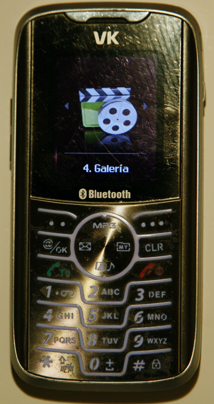 VK Mobile 2020